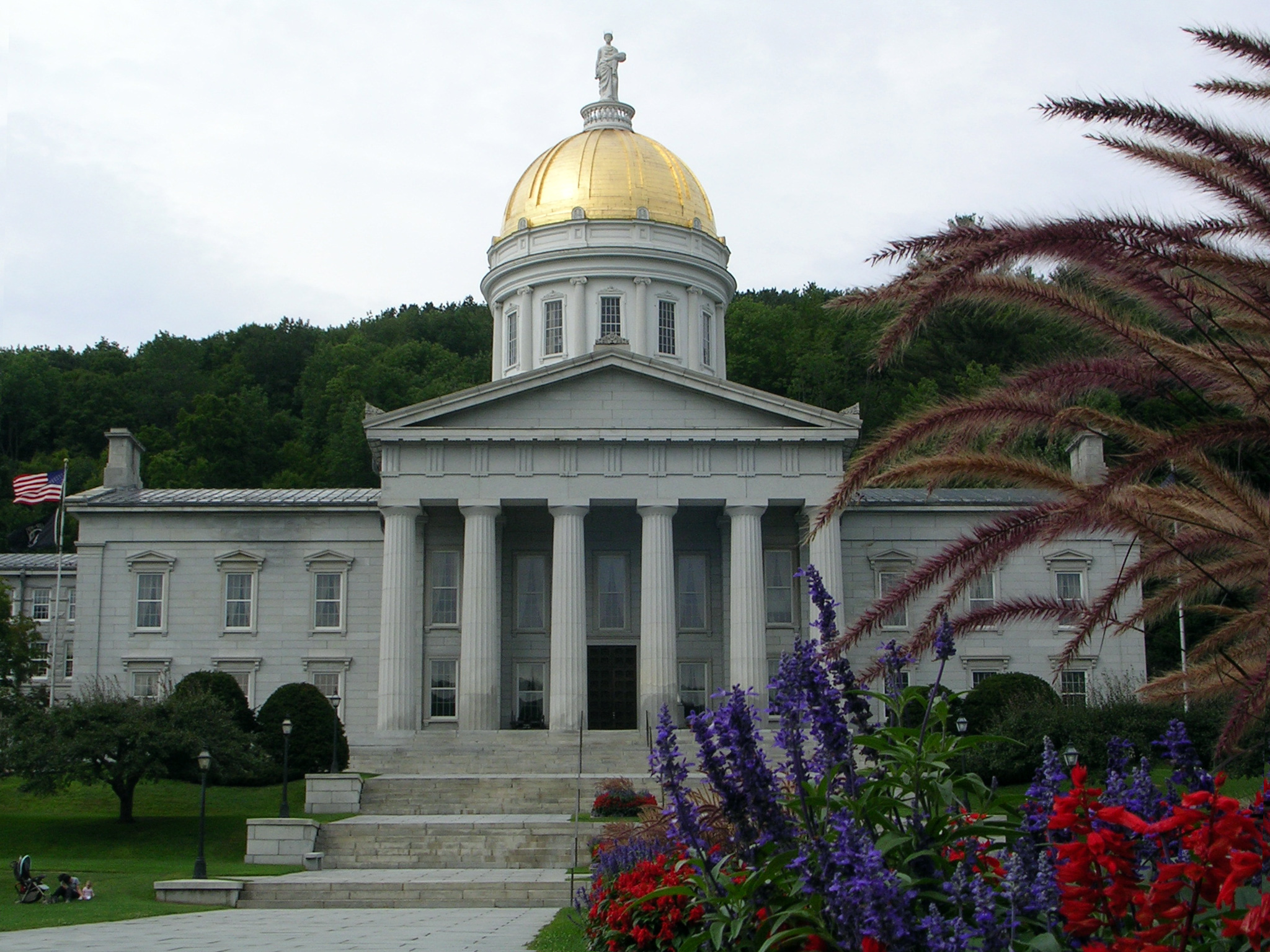 Kapitol des US-Bundesstaates Vermont in Montpelier (Bild: Alexander C. Wimmer)